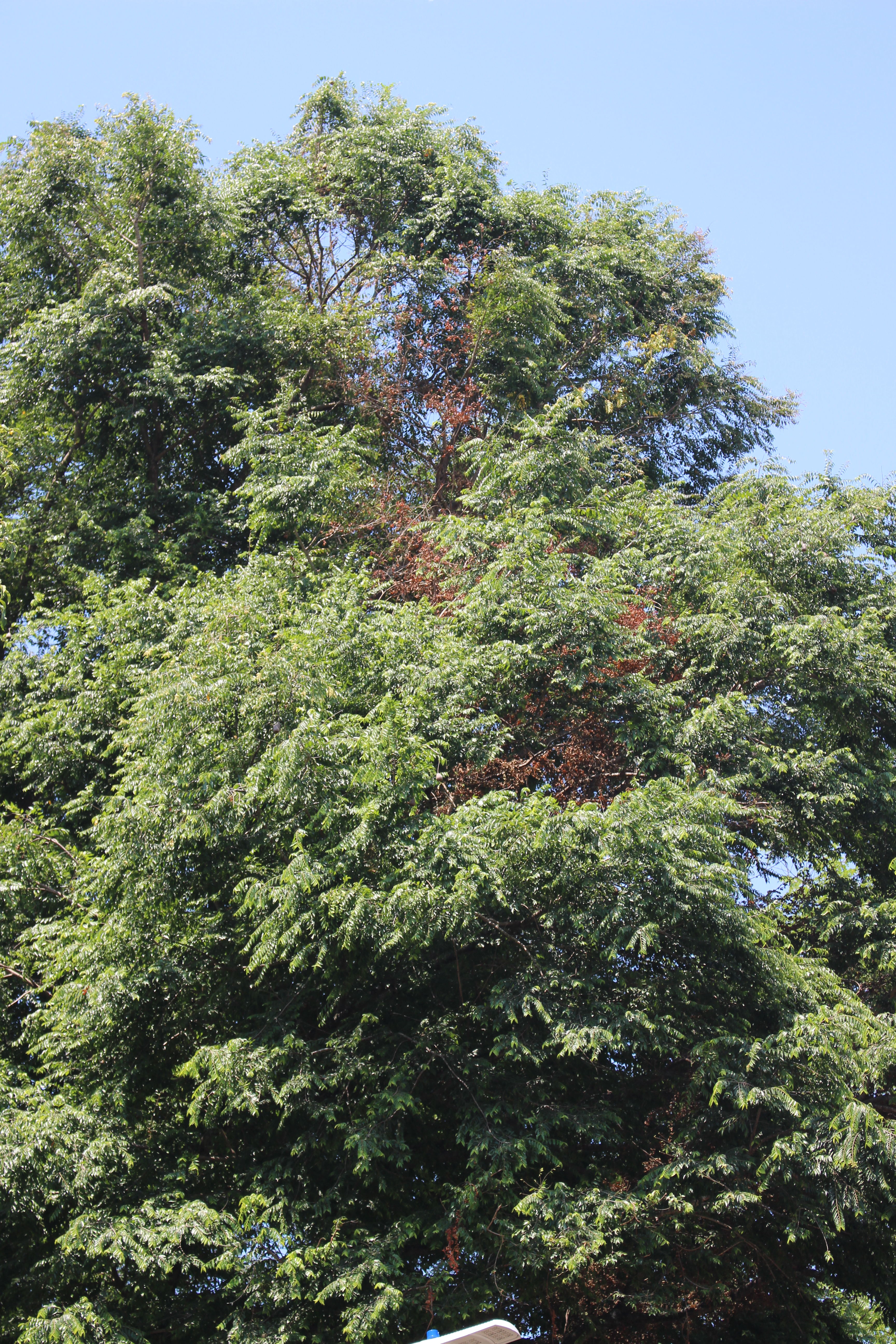 Abarco Caryniana pyriformis (Colegio seminario / Barrancabermeja Santander - Colombia)